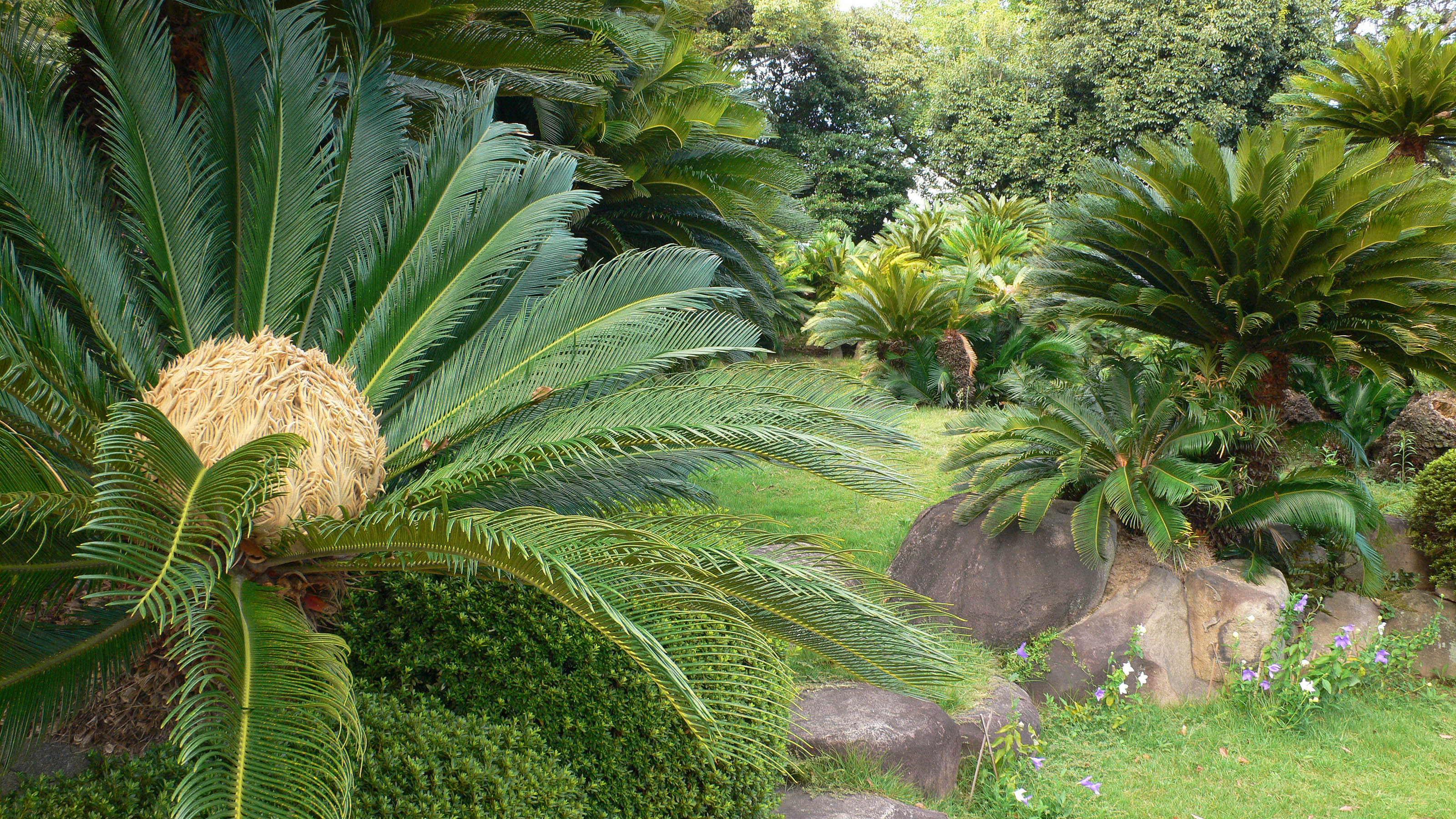 "Sorakuen" in Kobe, Hyogo, Japan